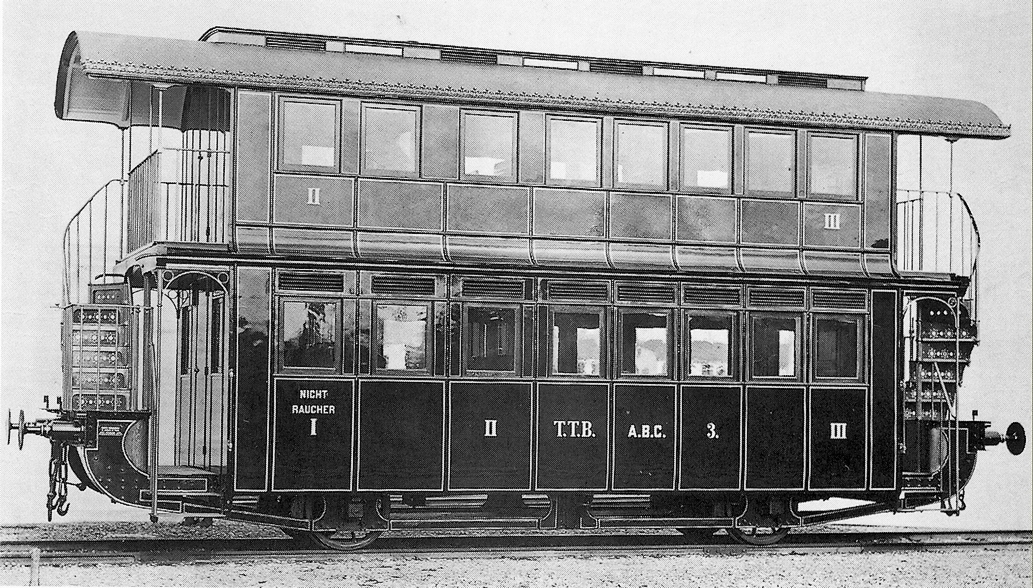 Doppelstockwagen der Tößthalbahn von 1875